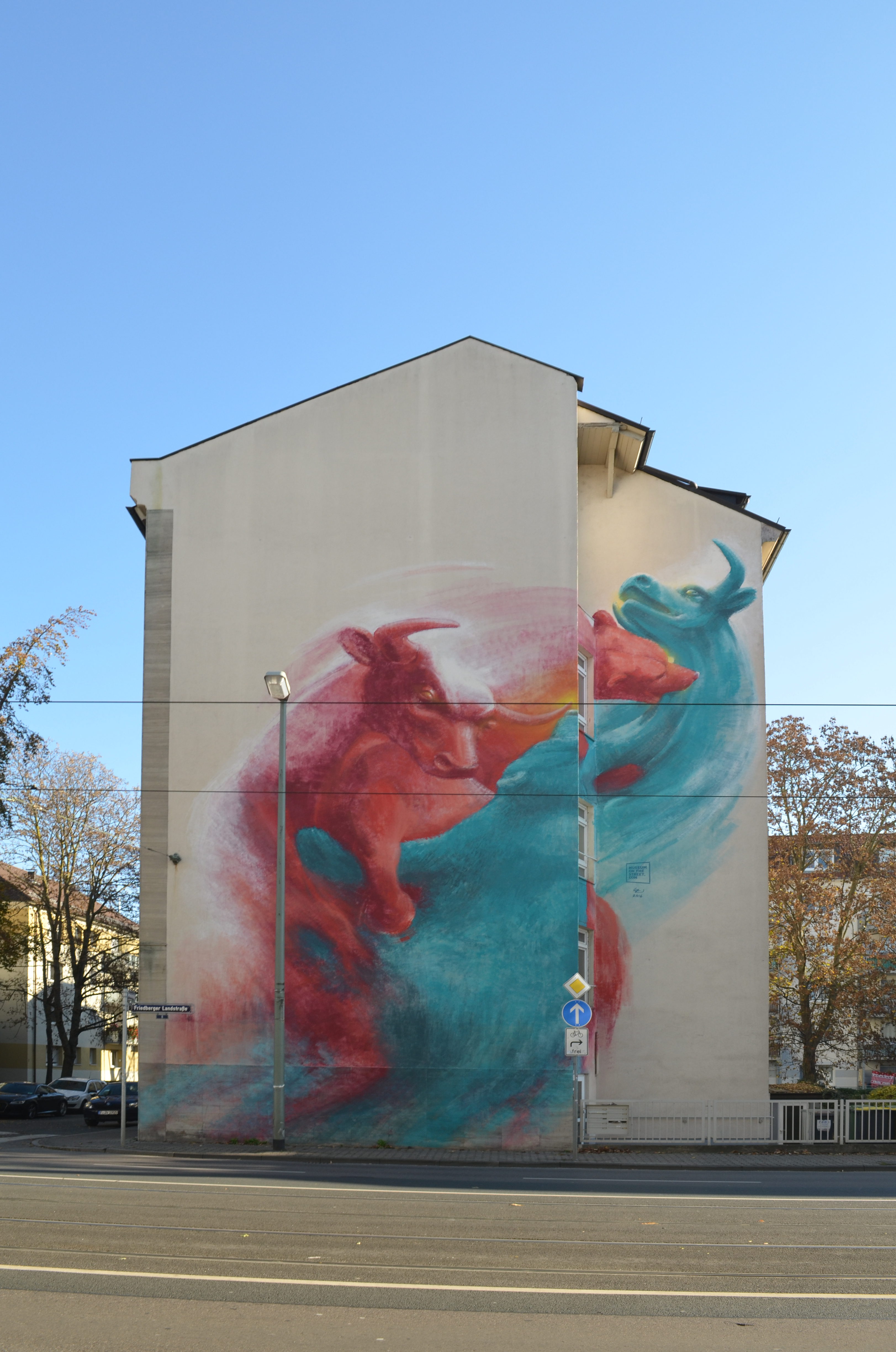 Frankfurt, Rotteckstraße 7